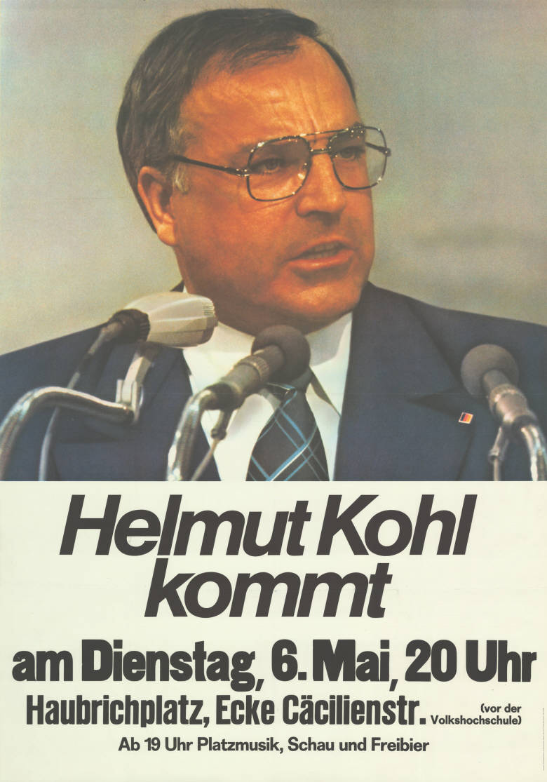 Helmut Kohl kommt ... ... Platzmusik, Schau und Freibier Abbildung: Kohl vor Mikrofonen Plakatart: Kandidaten-/Personenplakat mit Porträt Auftraggeber: CDU-Bundesgeschäftsstelle, Abt. Öffentlichkeitsarbeit, Bonn Drucker_Druckart_Druckort: Willy F.P. Fehling GmbH, Hannover Objekt-Signatur: 10-009 : 805 Bestand: Landtagswahlplakate Nordrhein-Westfalen (10-009) GliederungBestand10-18: Landtagswahlplakate Nordrhein-Westfalen (10-009) » CDU Lizenz: KAS/ACDP 10-009 : 805 CC-BY-SA 3.0 DE